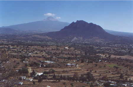 Vista del volcán Cuatlapanga